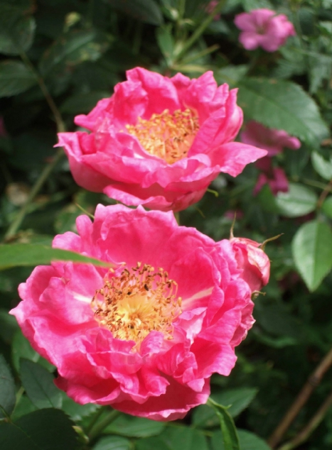 Rosa 'Rosenwunder' (Kordes, 1934)